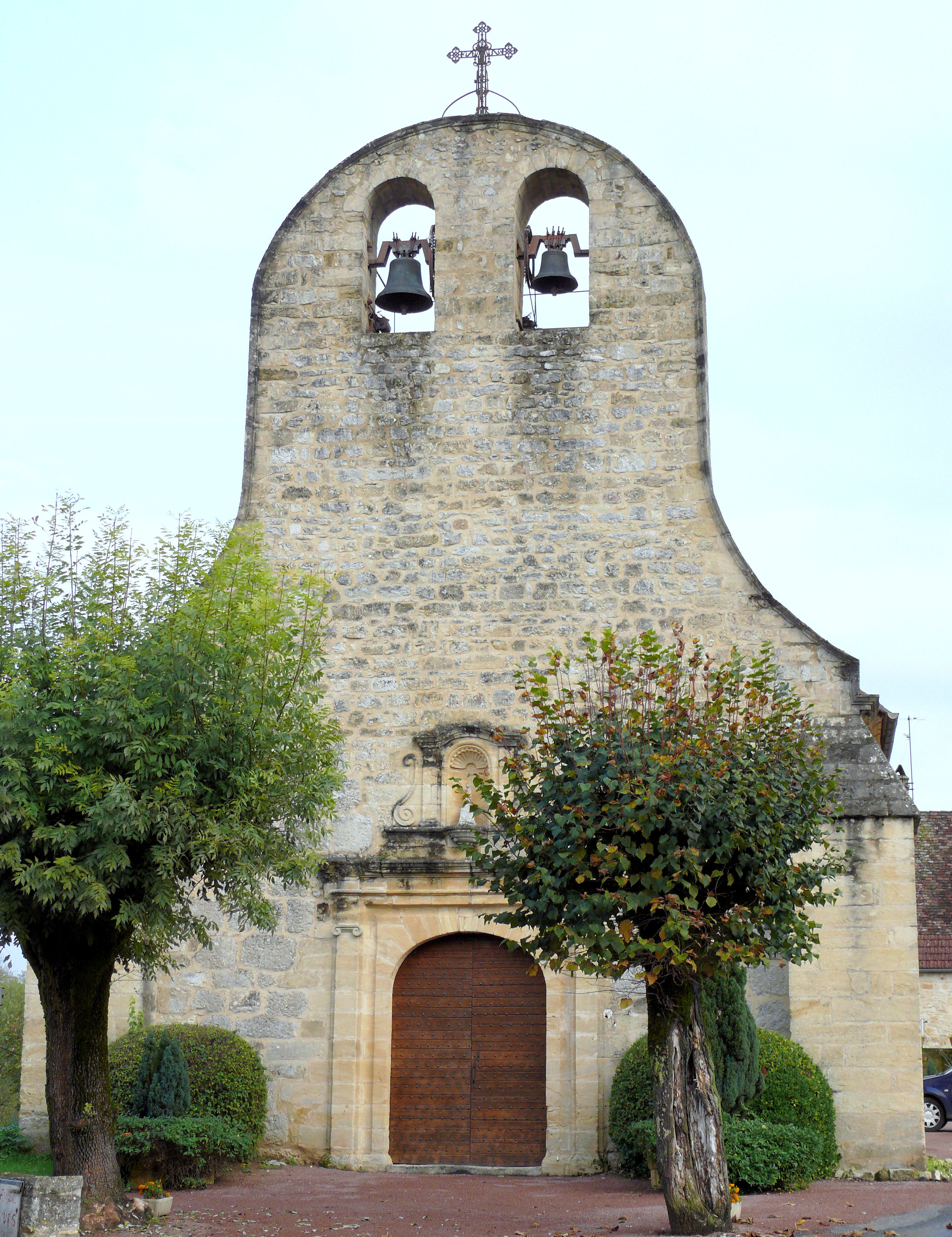 Berbiguières - Eglise Saint-Denys